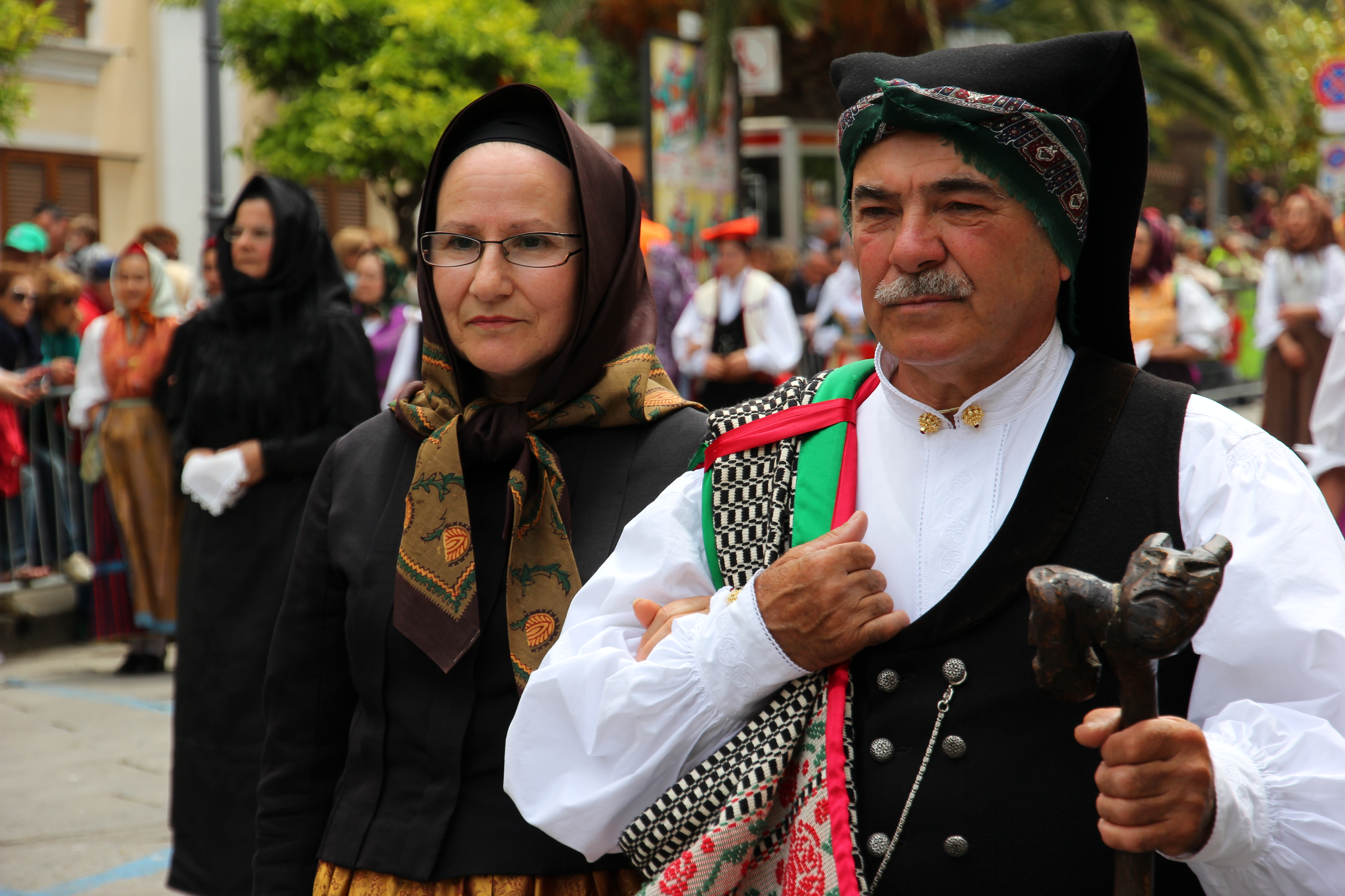 Costume tradizionale